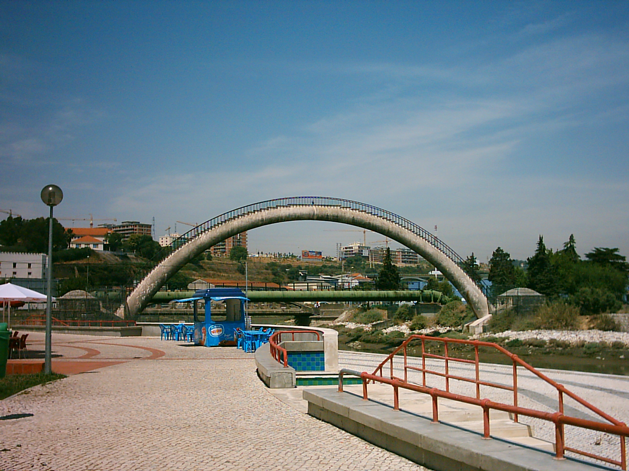 Arco em sifão sobre o Rio Trancão em Sacavém, Portugal